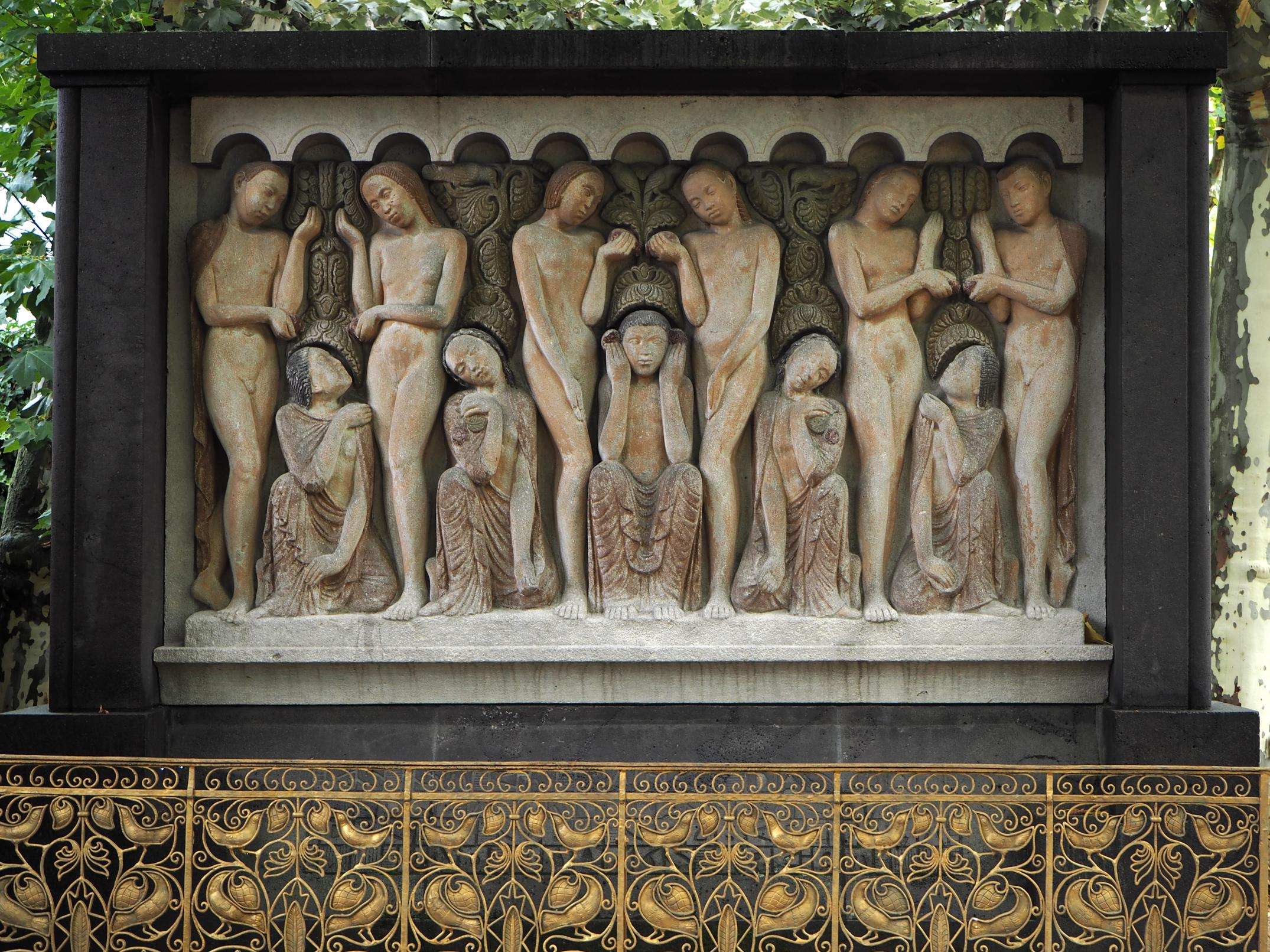 Darmstadt, Mathildenhöhe, Bernhard Hoetger: Relief Frühling, Foto: Juli 2017